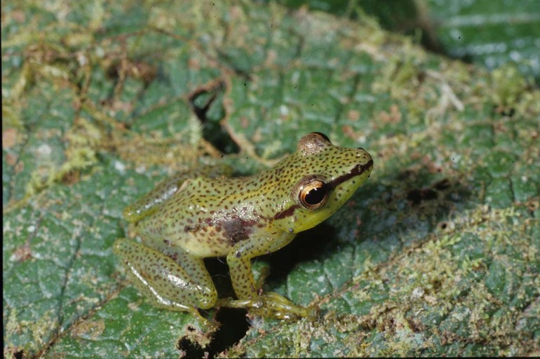 Mantidactylus punctatus = Guibemantis punctatus